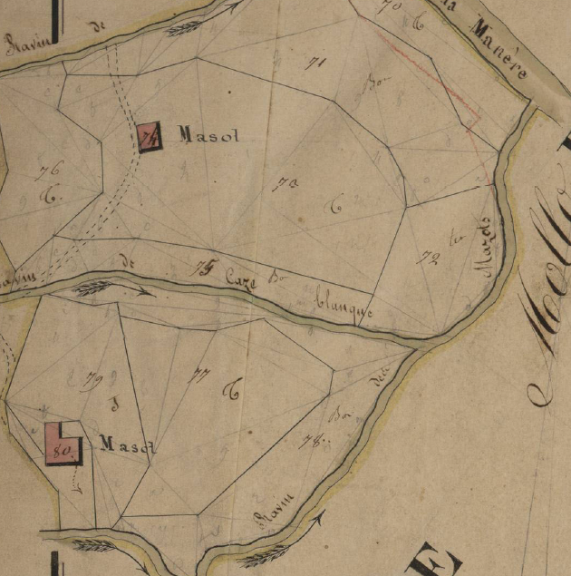 Els Masots de Serrallonga en el Cadastre napoleònic del 1812 (Arxius Departamentals dels Pirineus Orientals)